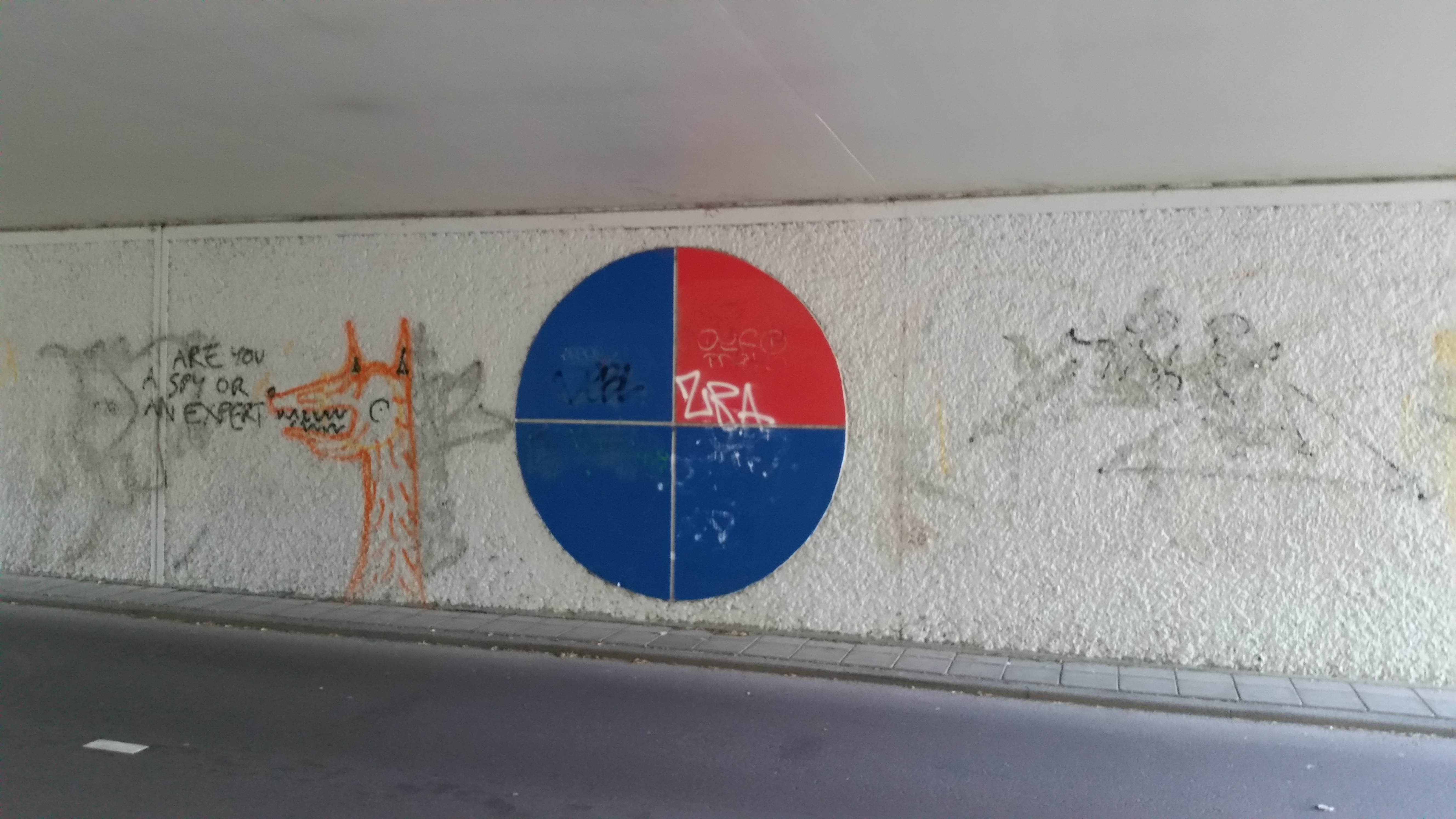 Brug 704 (in Amsterdam), cirkelvormige versieringen en graffiti